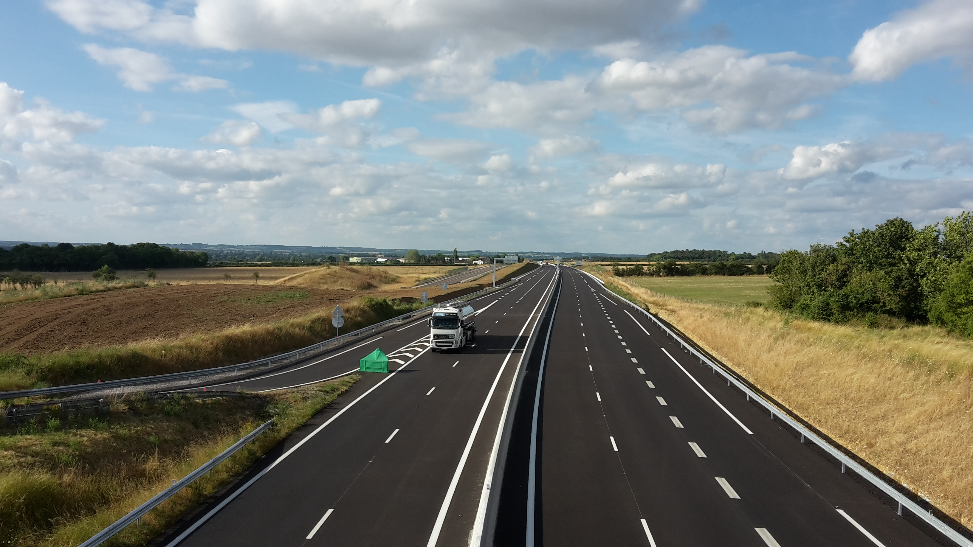 Route Nationale 7 à hauteur de Saint-Pierre-le-Moûtier, en direction de Paris